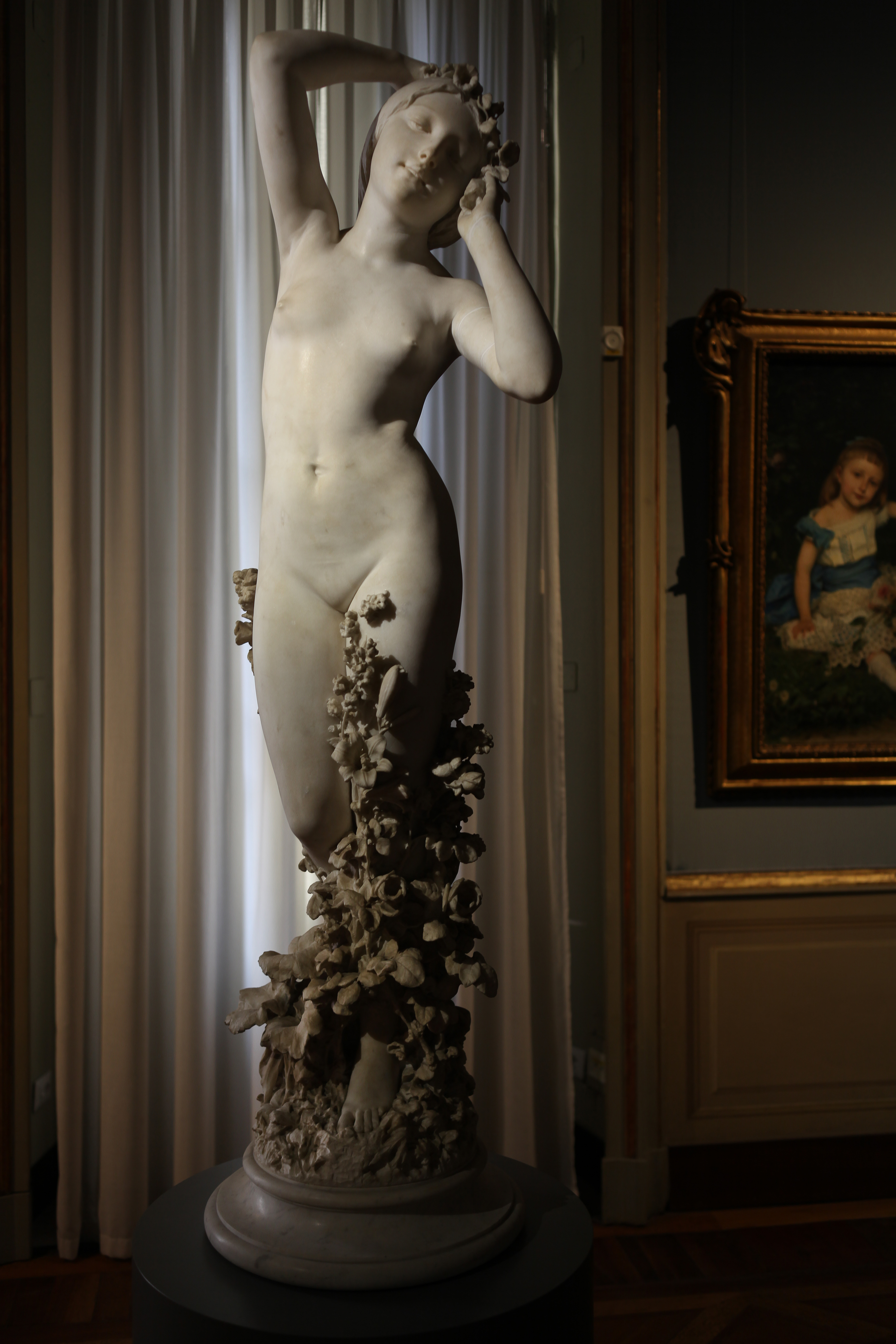 Flora (Vincenzo Vela) 1882, Galleria d'Arte Moderna di Milano